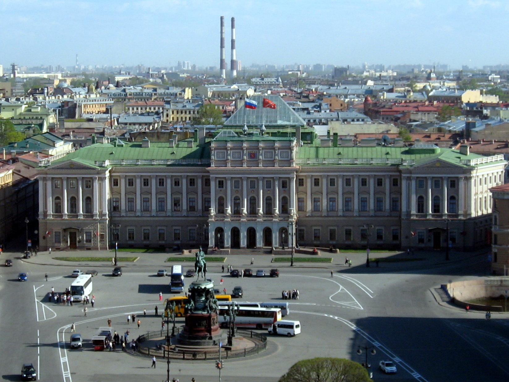 Sankt-Petěrburg, výhled z Katedrály svatého Izáka